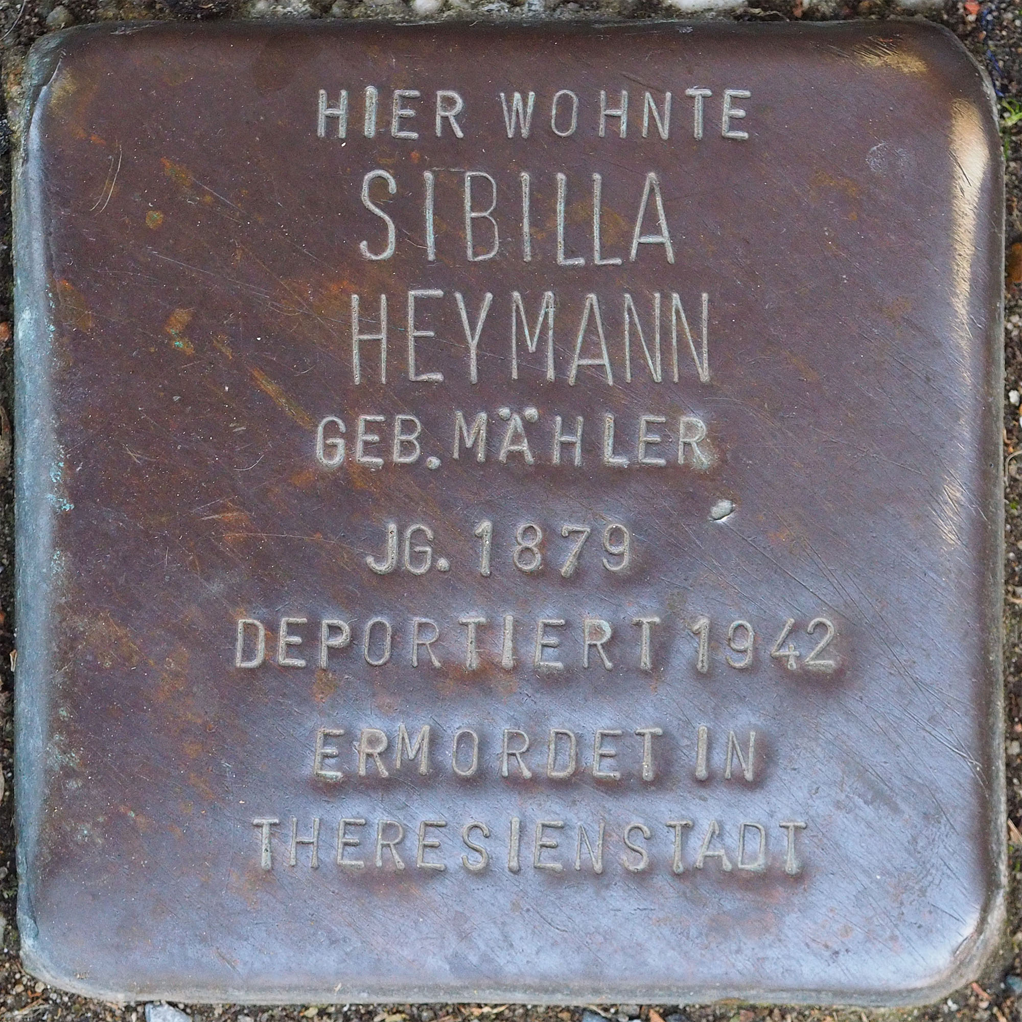 Stolperstein VIE: Heymann, Sibilla